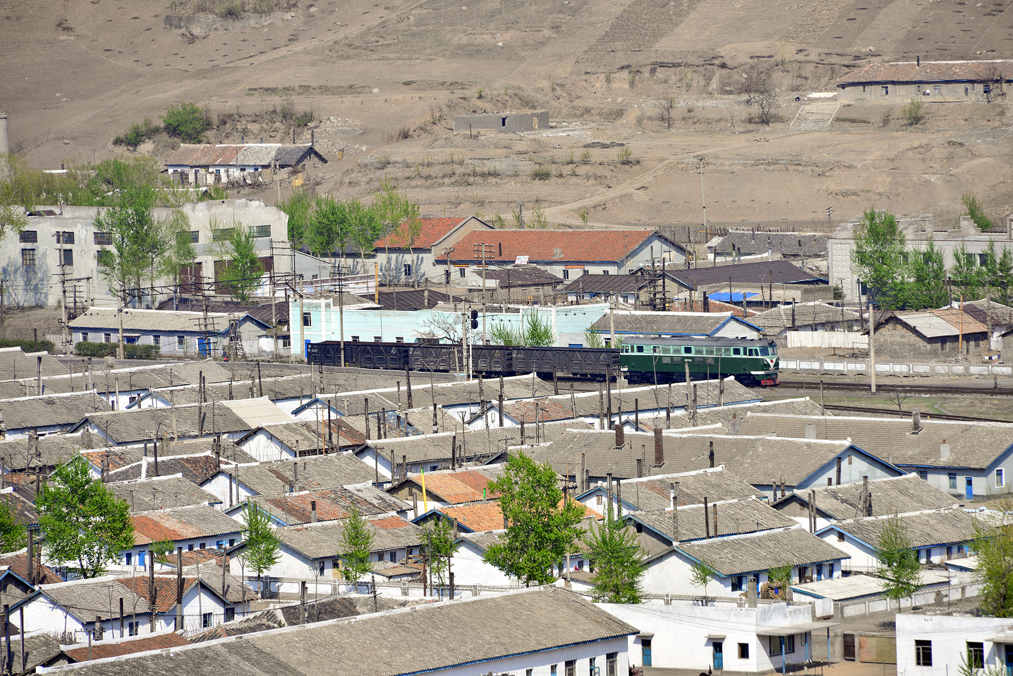 DFH3 In Namyong station